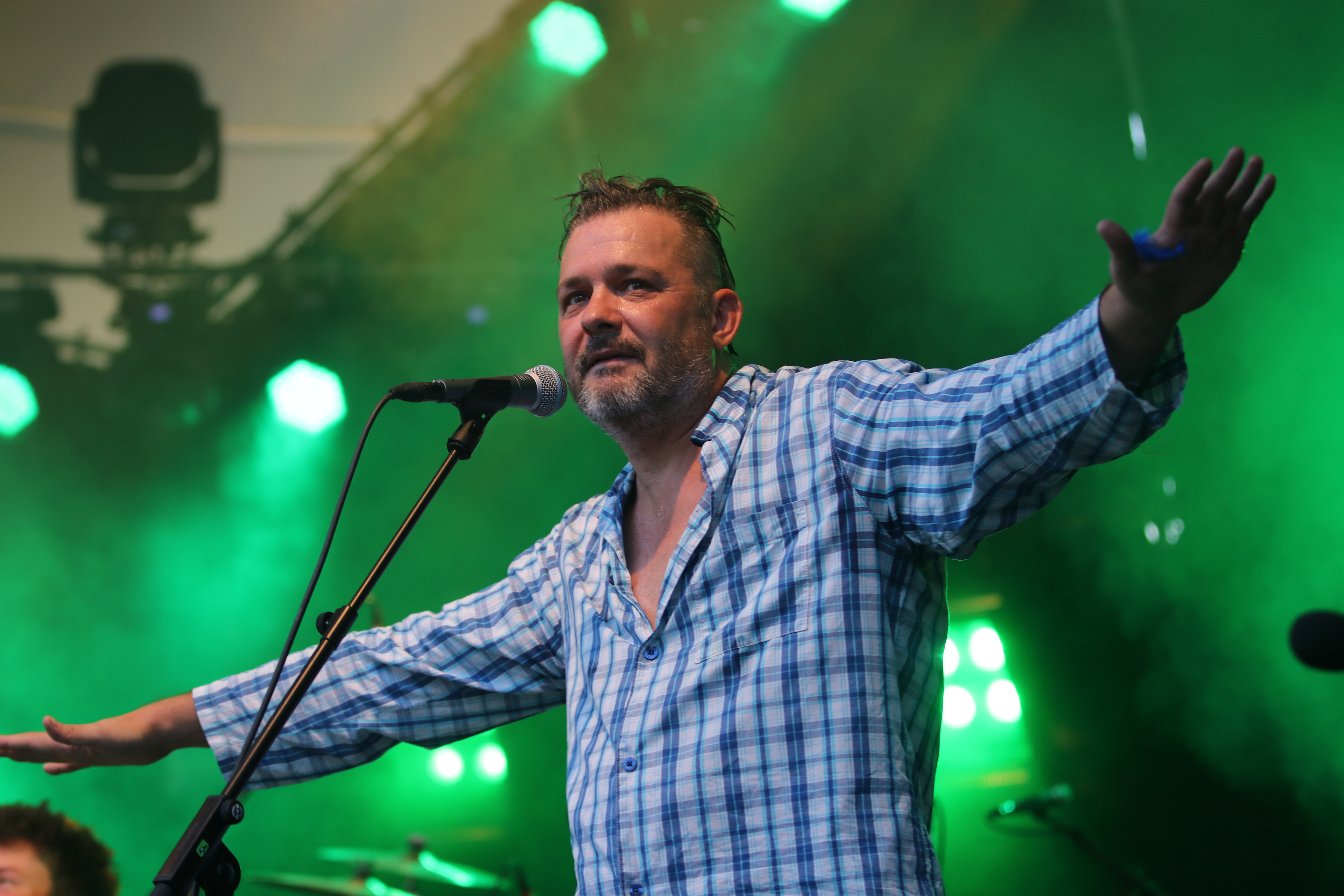 Fortuna Ehrenfeld, Liedermacherpop für Erwachsene aus Köln, am 2018-08-17 im Münchner Theatron.